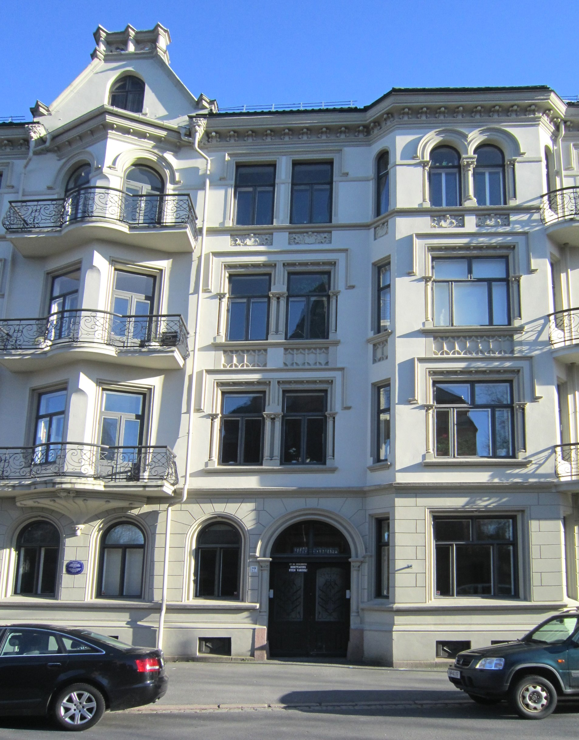 Skovveien 39B-C i Oslo. Johan Sebastian Welhaven bodde i et hus som står i bakgården her, mot slutten av sitt liv.